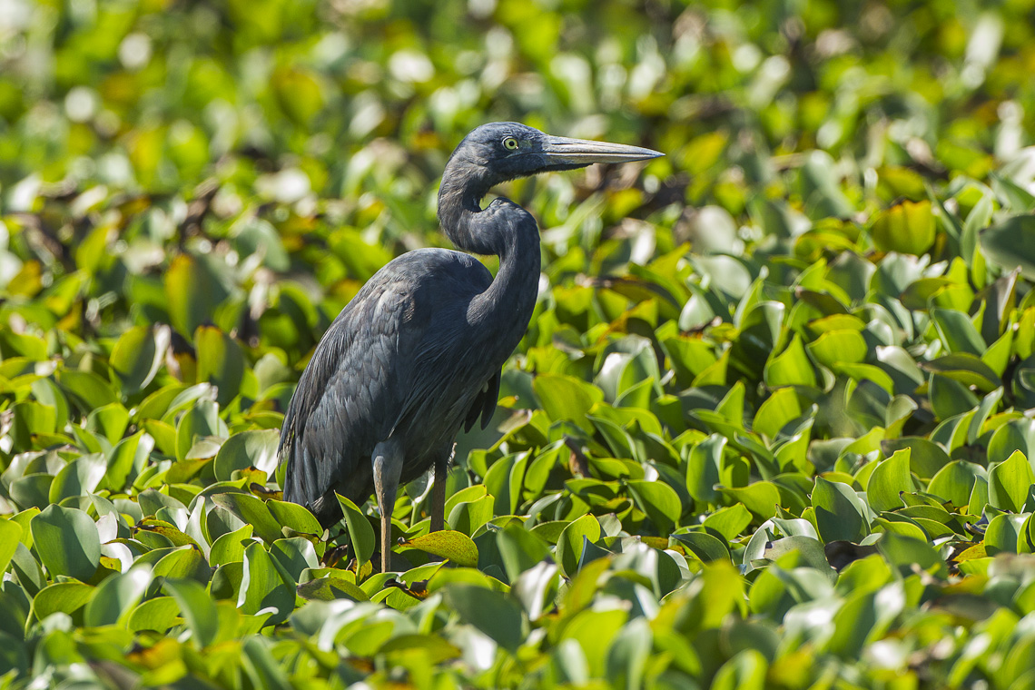 Humblot's Heron - Ankarafantsika - Madagascar